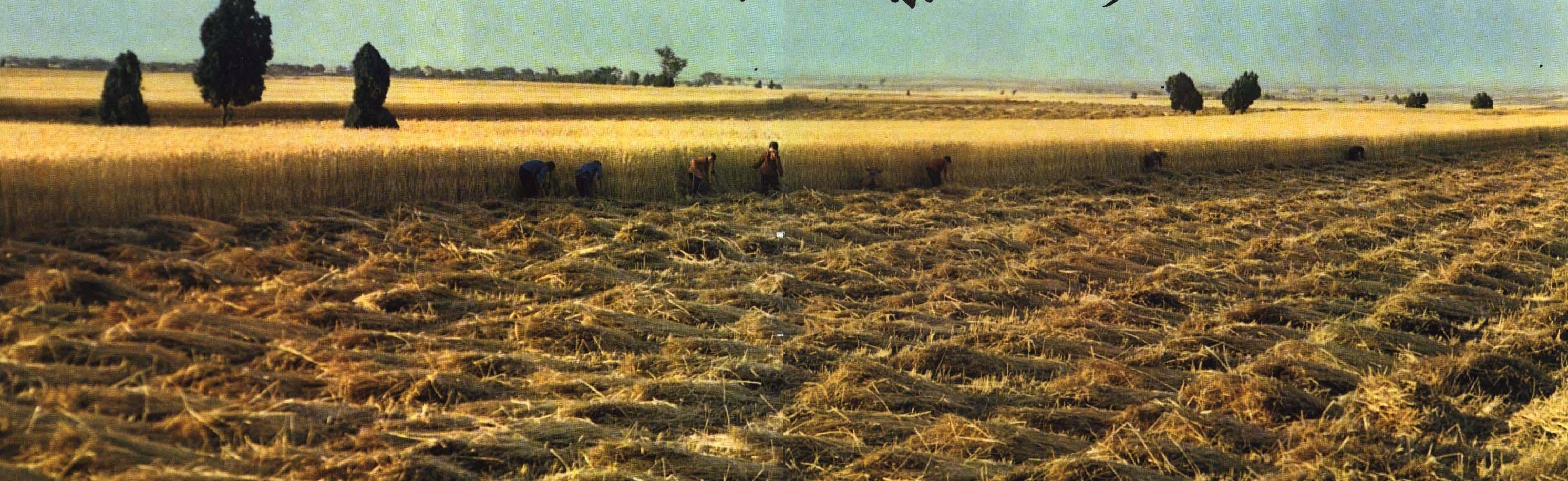 1965-8 1965 渭河平原麦田